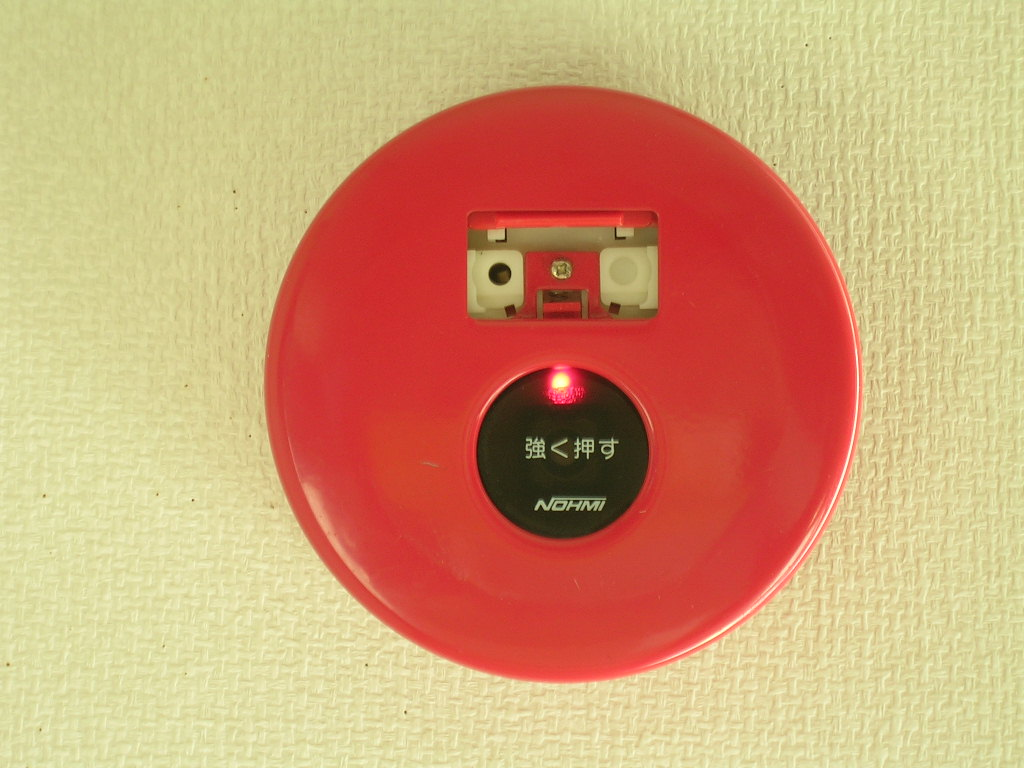 P型1級発信機（能美防災製 FMM120A型）発報状態＆電話ジャックカバー開放